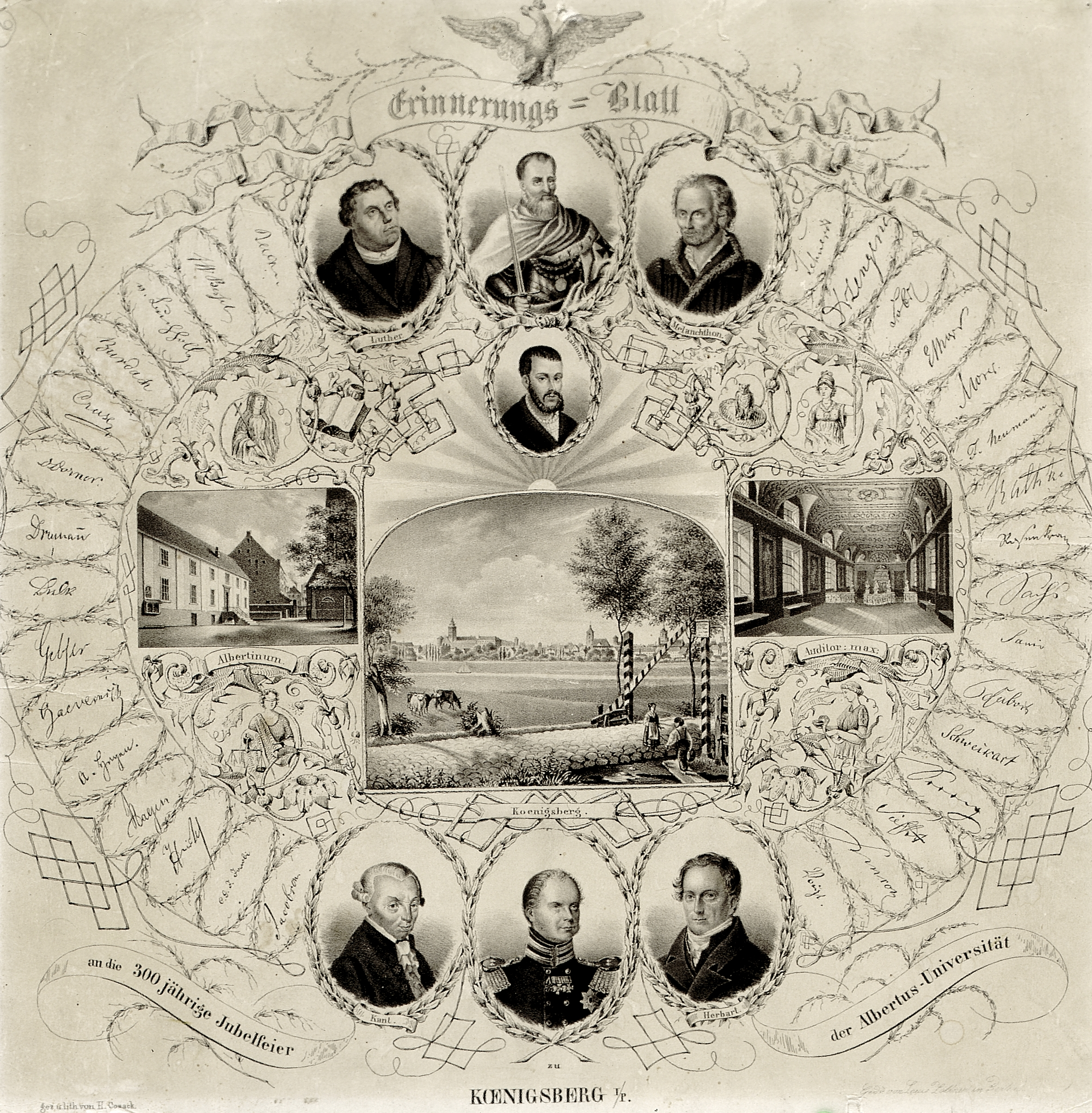 Die 300 Jahrfeier der Universität Königsberg